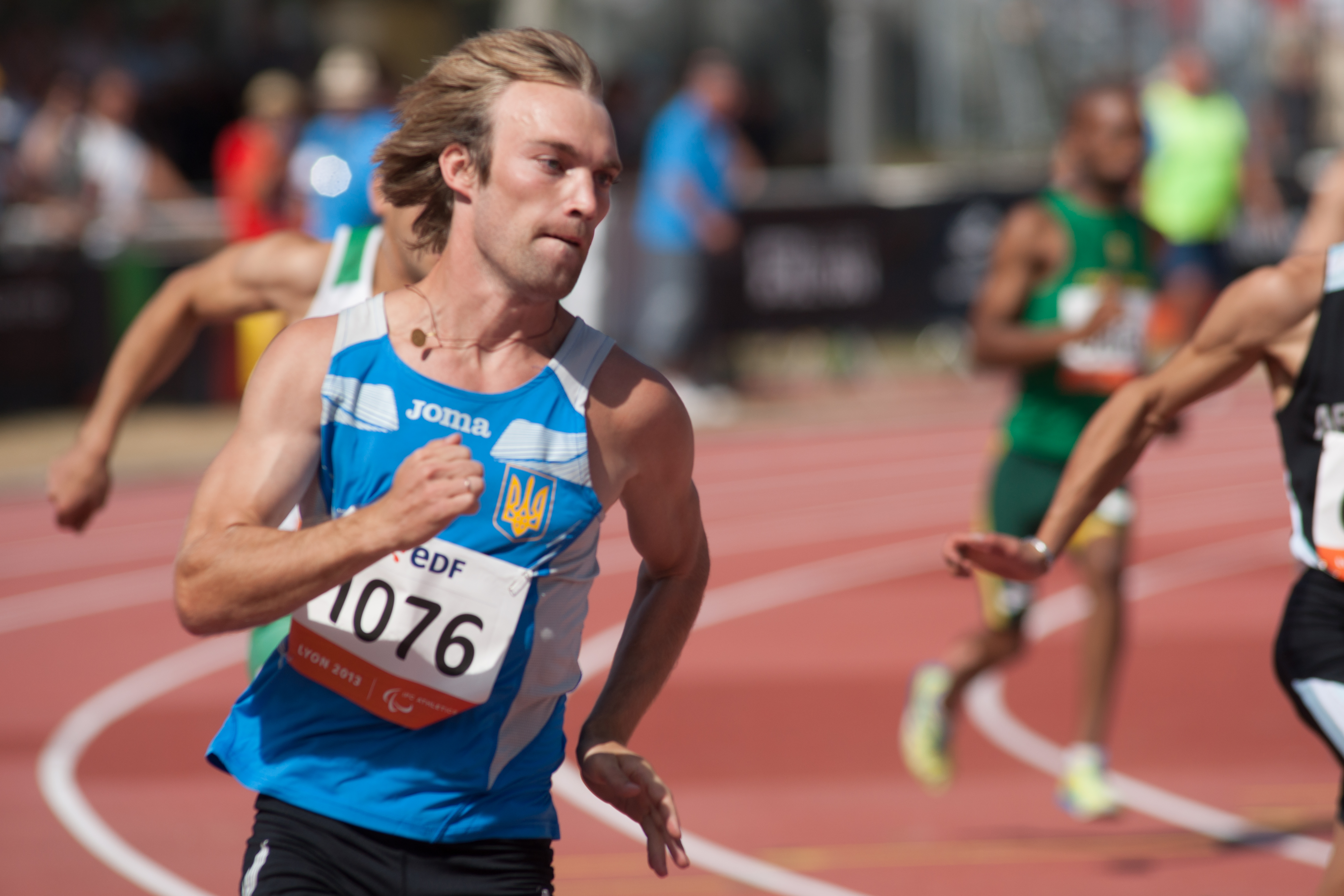 Championnats du monde d'athlétisme IPC 2013. 200 mètres masculin T35.